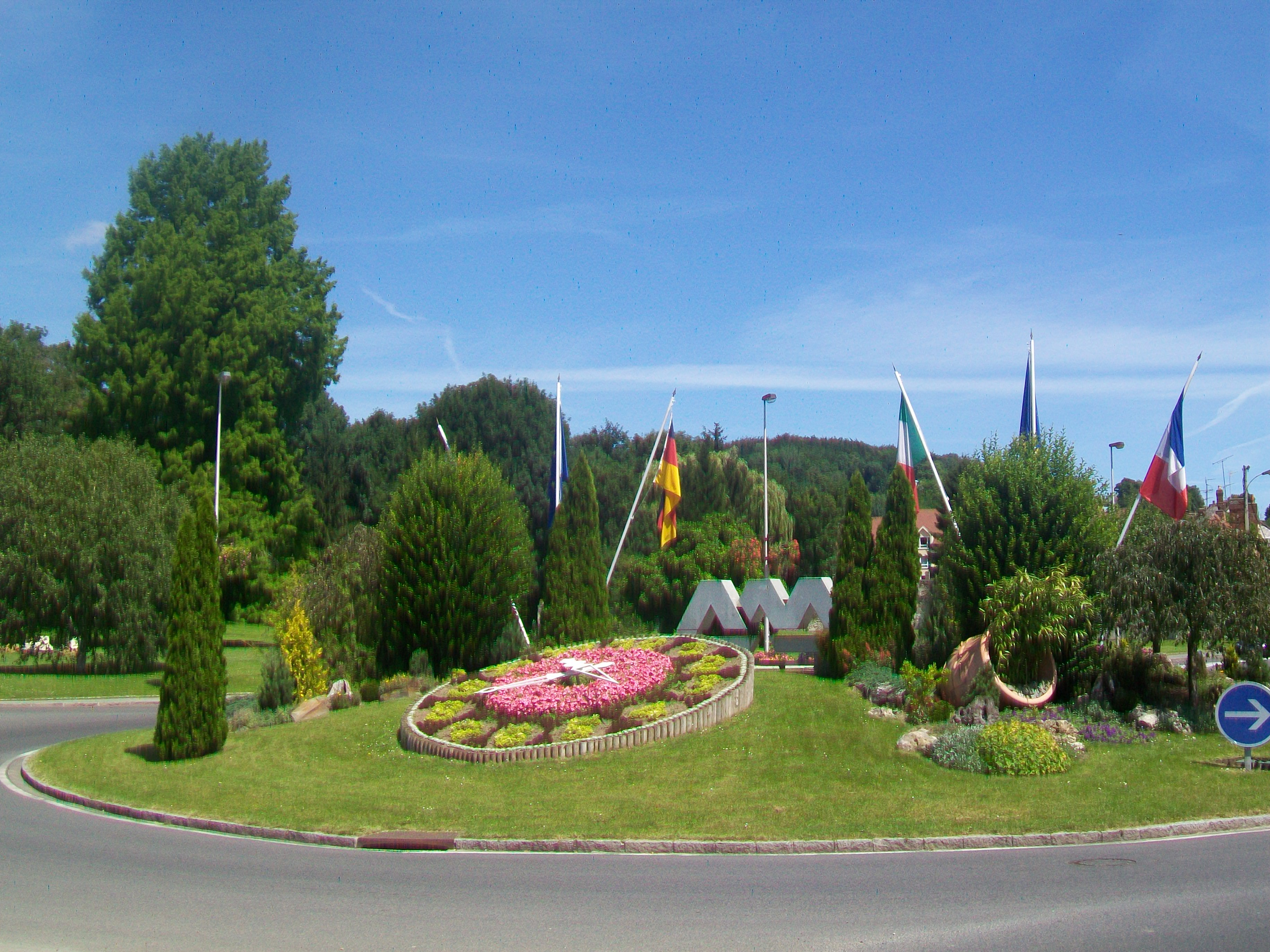 Le rond-point de l'Île-de-France à l'entrée ouest du centre-ville, près du parc et du château.